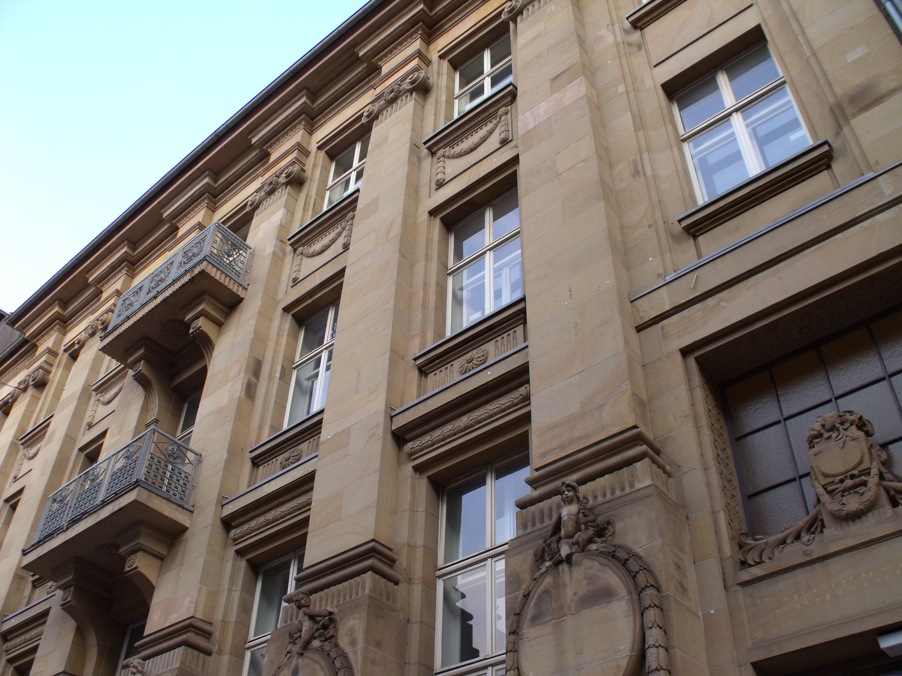 Fassade des Gebäudes Düsseldorfer Straße 19 in Duisburg; erbaut 1905 für die Mittelrheinische Bank, seit 1988 unter Denkmalschutz, heute Campus Süd der Folkwang Universität der Künste